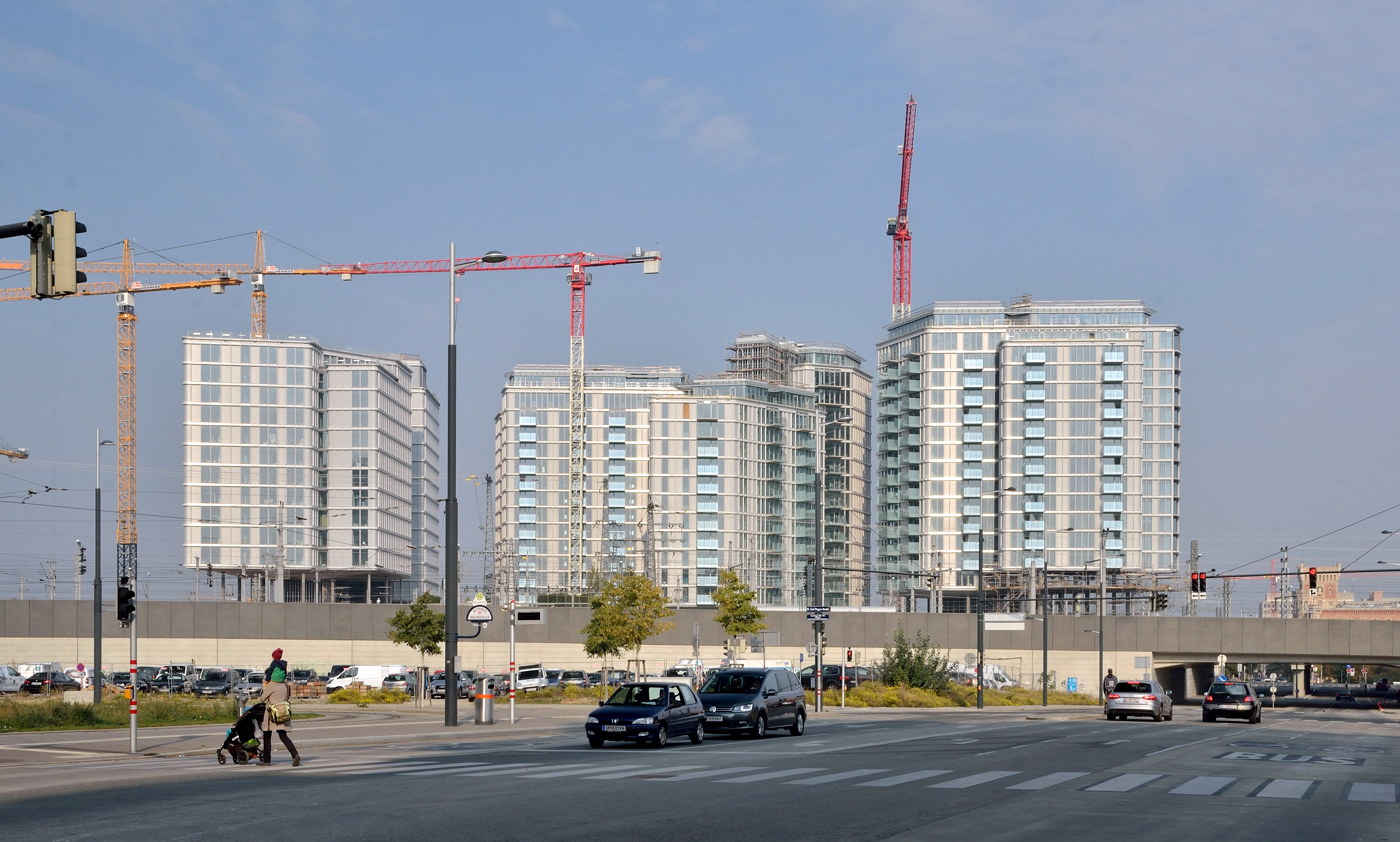 Baustelle Parkapartments am Belvedere gesehen von der Alfred-Adler-Straße über den Zubringer zum Hauptbahnhof.